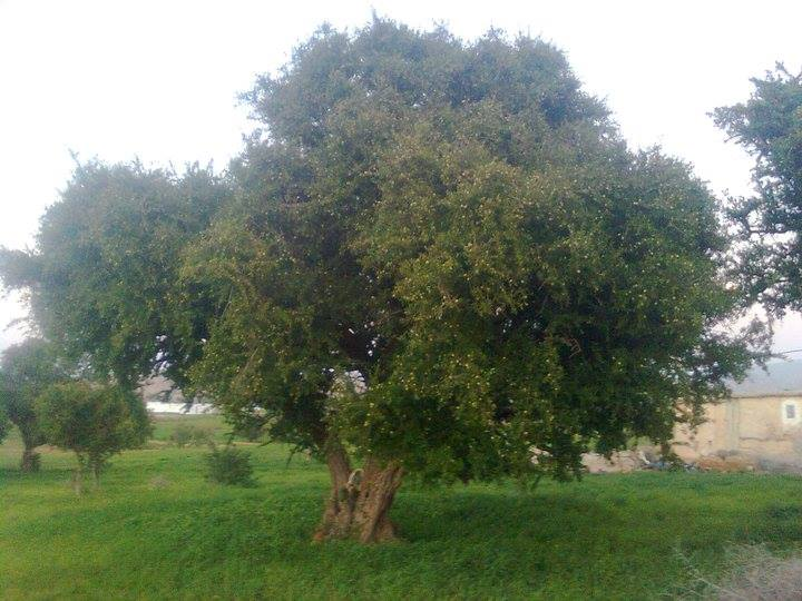 صورة لشجرة الأركان